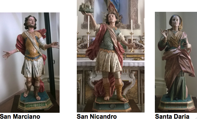 Realizzati dallo scultore napoletano Alfonso Postiglione nel 1719, commissionati da Baldassarre Cattaneo Della Volta principe di San Nicandro